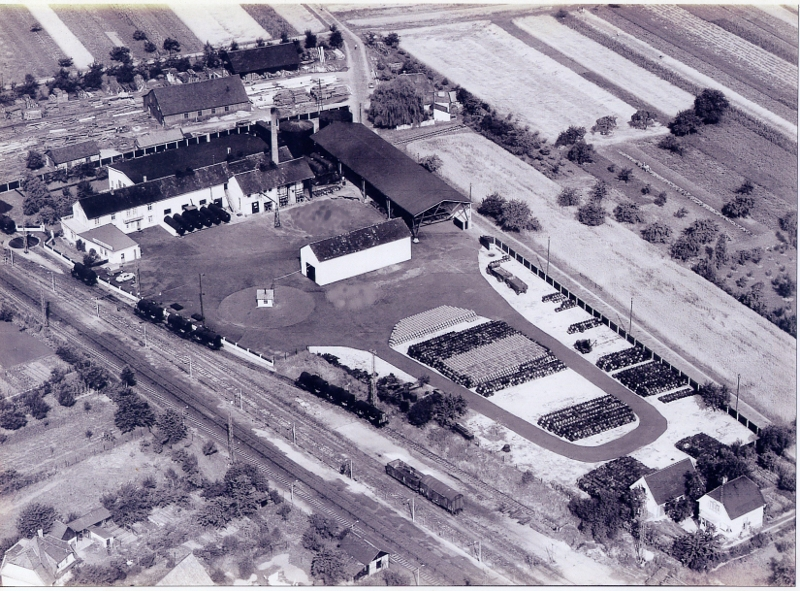 Luftaufnahme der Süddeutschen Teerindustrie von 1956. Zu jener Zeit erfolgte die Anlieferung der Rohstoffe noch über Bahnwagons, die mittels einer Drehscheibe aufs Firmengelände gelangten, um dort abzuladen.